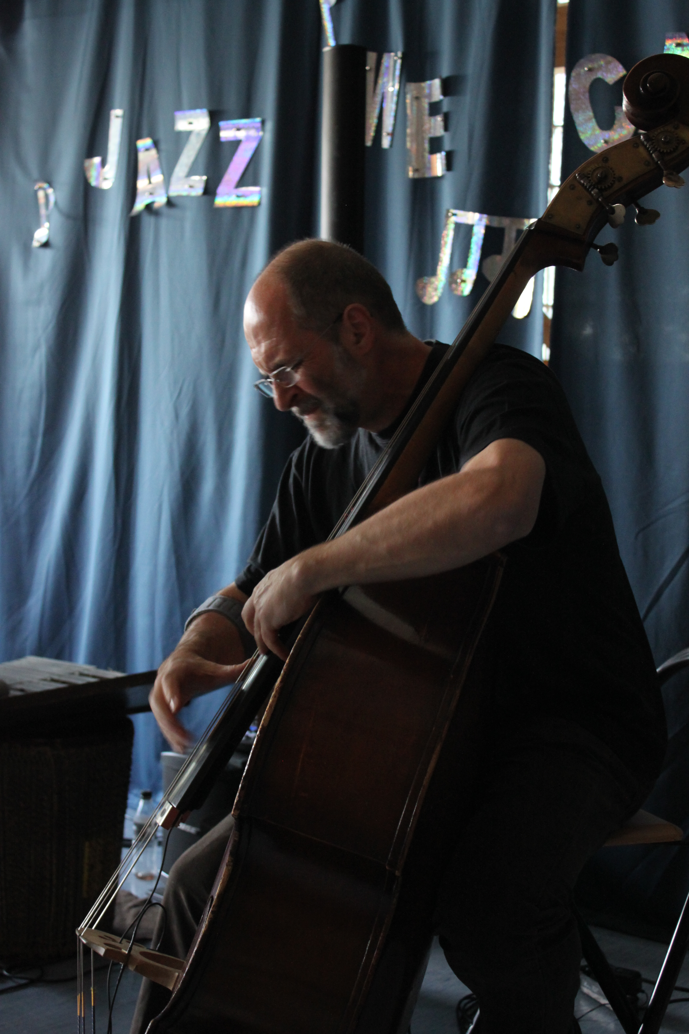 Jazzbassist Christoph Niemann bei einem Konzert mit Triologic im "Jazz We Can" in Bad Marienberg (Westerwald) am 7. August 2011